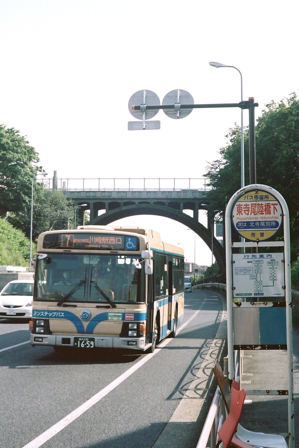 響橋付近の第二京浜国道を運行する横浜市営バス7系統川崎駅西口行、2012年5月19日撮影